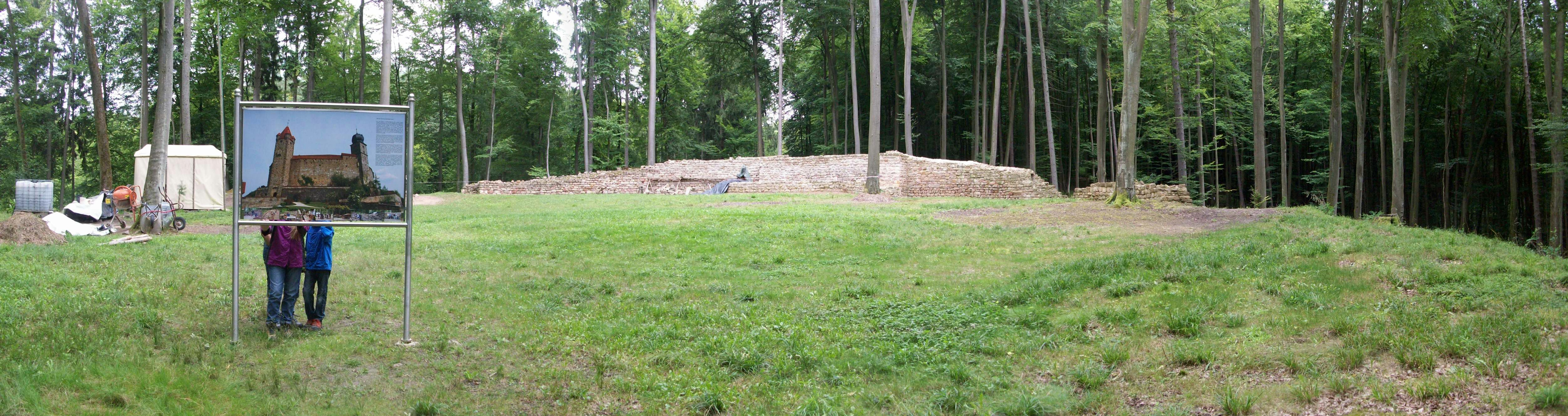 Panorama des Burgstalles vom heutigen Aufgang mit Blick zur Informationstafel